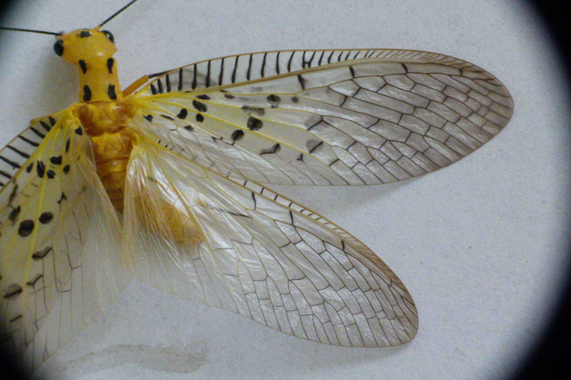 Nevromus austroindicus Liu & Viraktamath, 2012. From Mudigere, India.